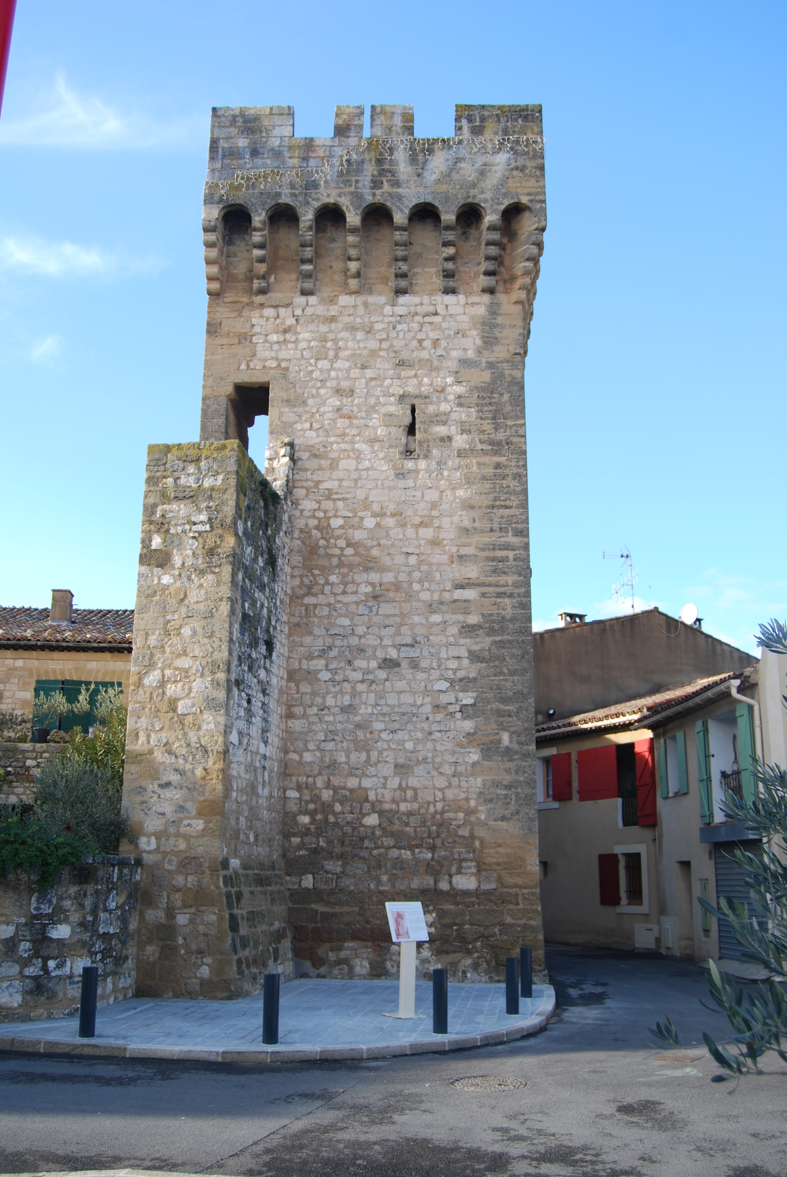 Tour Saint Jacques à Pertuis